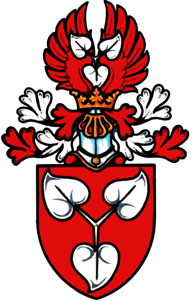 Eerb pánů z Říčan